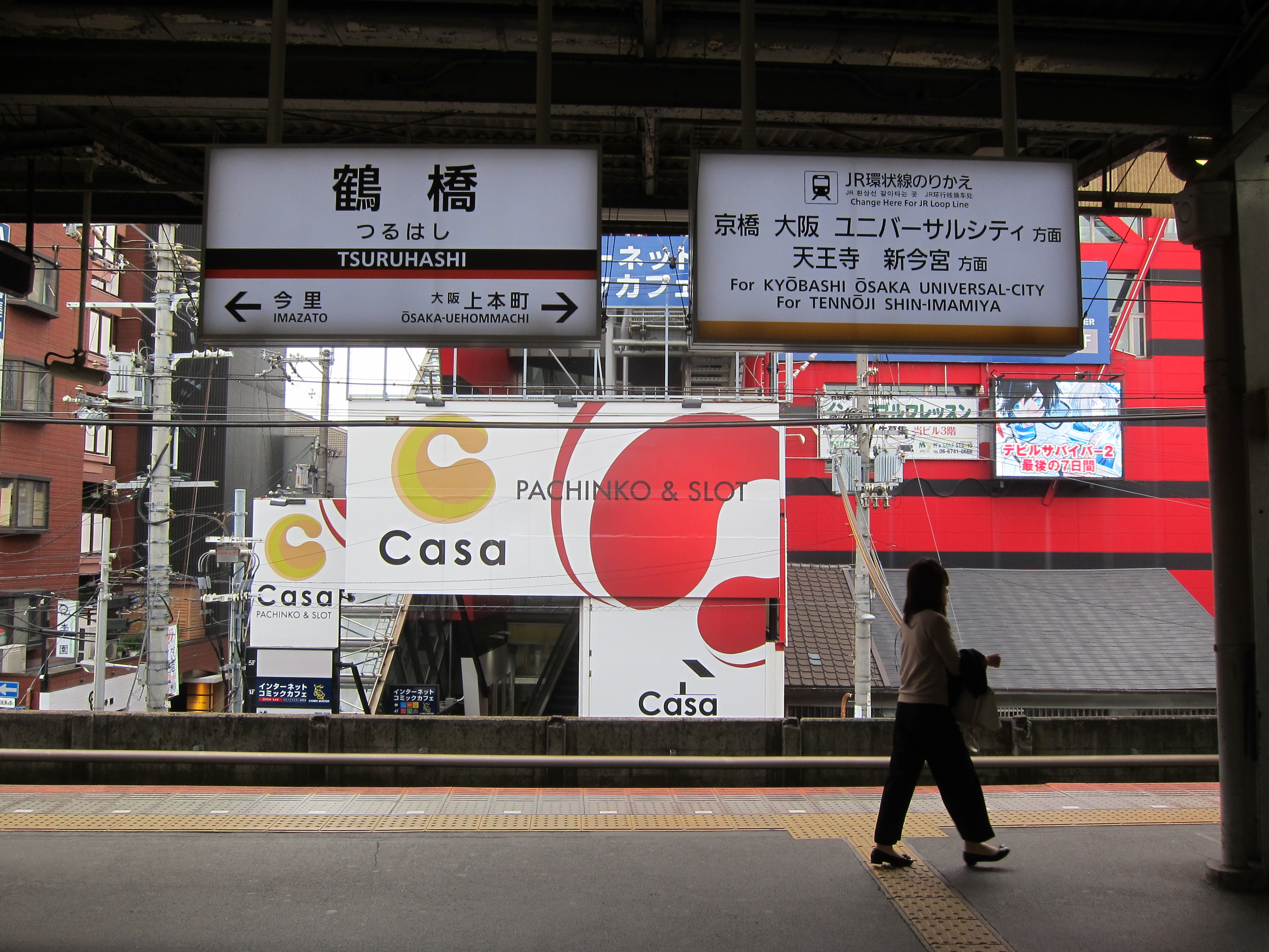 abeno harukas